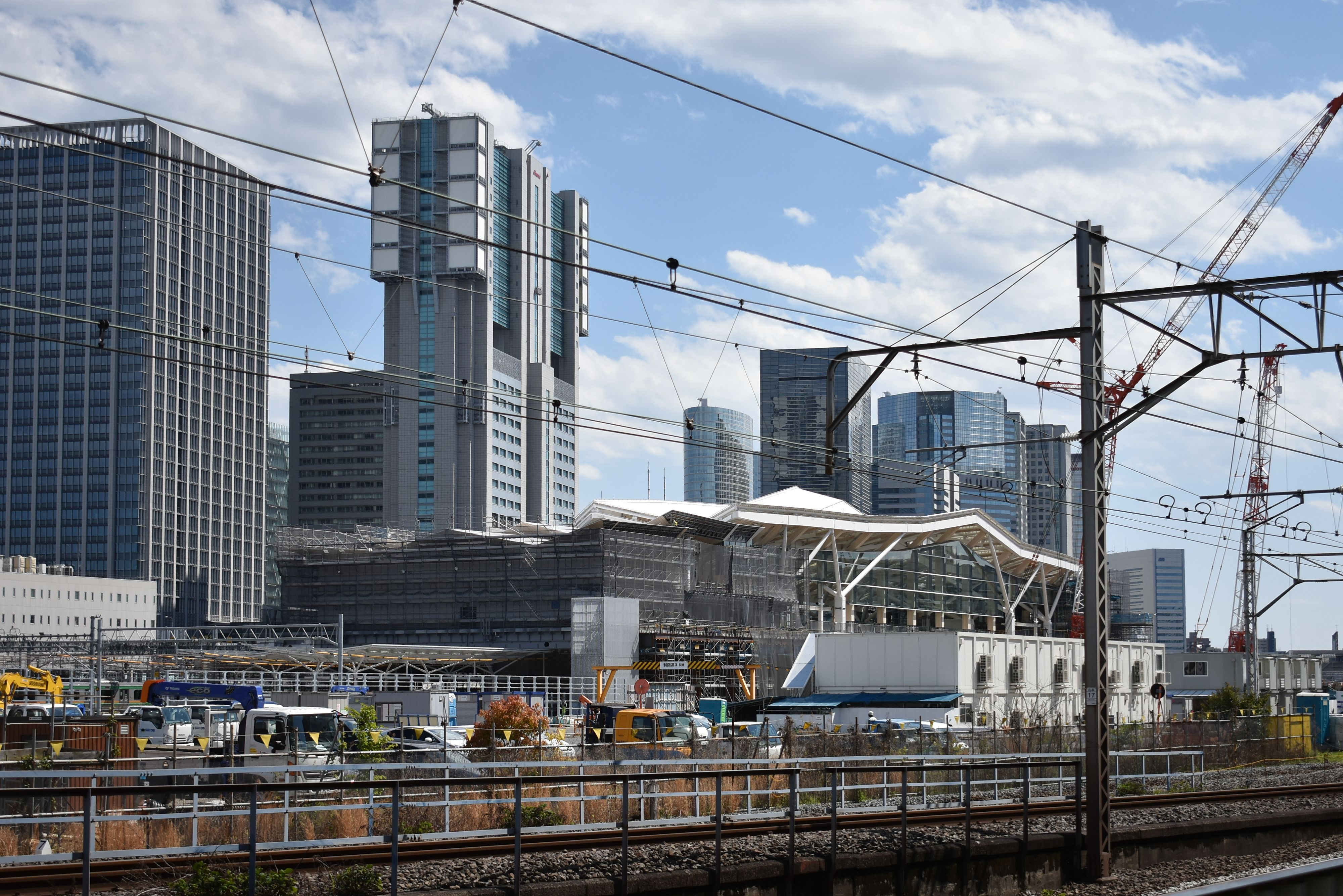 高輪ゲートウェイ駅 Nikon D3400